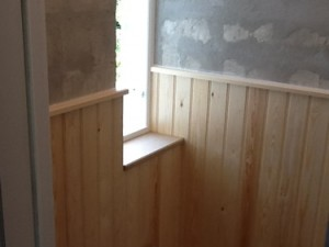 Opsætning af perlestaf.